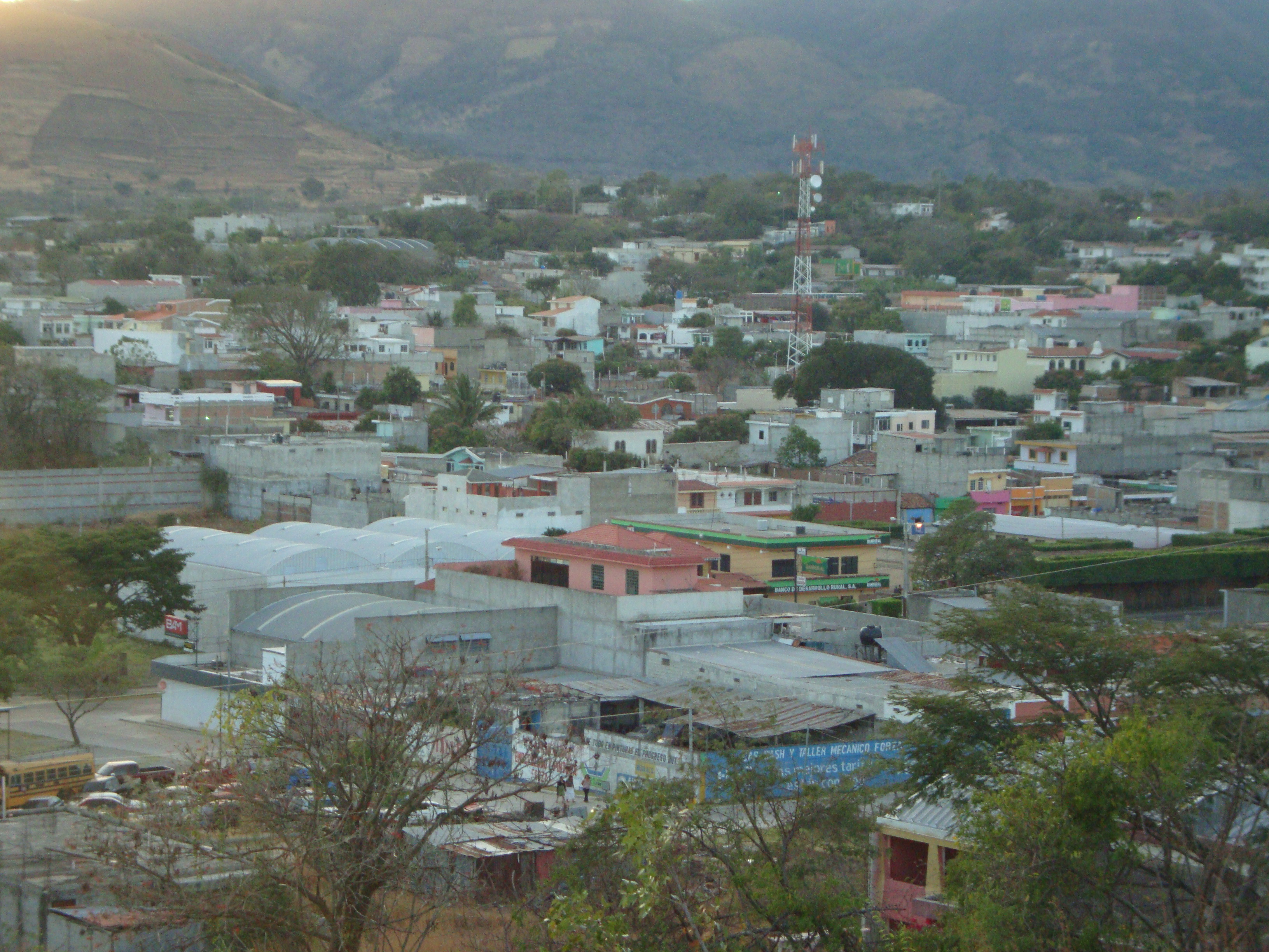 Vista aérea de una parte de la ciudad de El Progreso